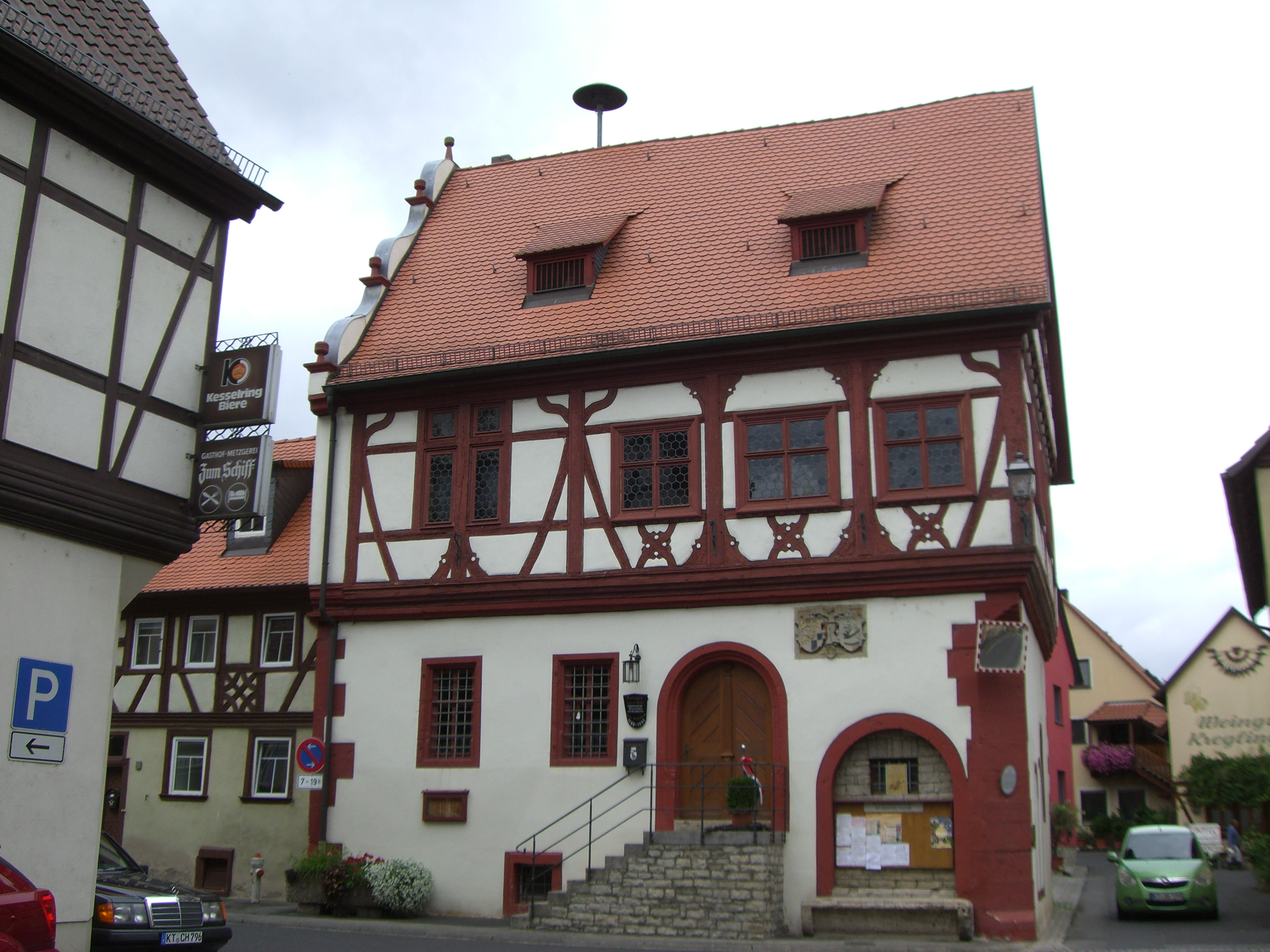 Segnitz, Rathaus, zweigeschossiger Satteldachbau mit vorkrakendem Zierfachwerkobergeschoss und Schweifgiebel von Hans Kesenbrod und Lorenz Ebel, 1588